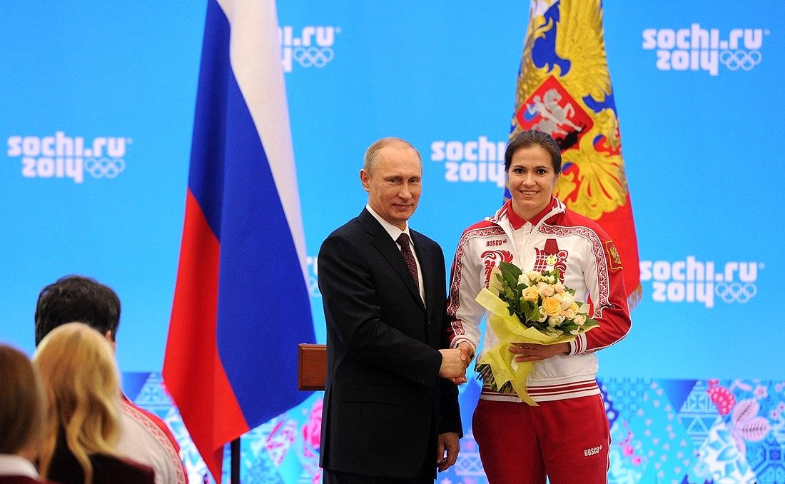 Медалью ордена «За заслуги перед Отечеством» первой степени награждена серебряный призёр Олимпийских игр в санном спорте Татьяна Иванова.